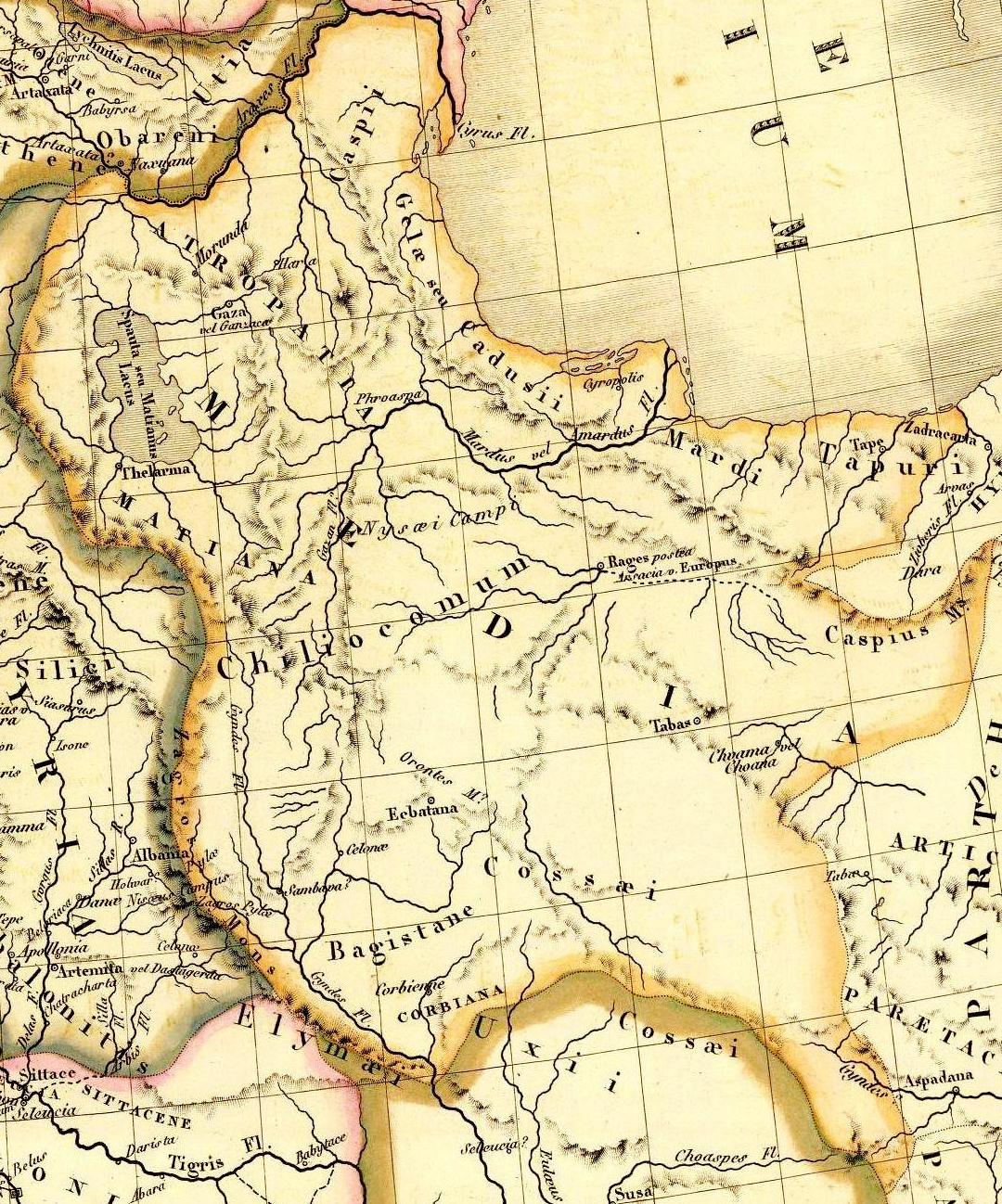 Carte generale de l'Asie-Mineure, de l'Armenie, de la Syrie, de la Mesopotamie, du Caucase &a. par A. Brue, Geographe du Roi. (with) Etat de l'Asie avant Cyrus et limites de l'Empire des Perses a la mort de ce Prince (560 et 579 av. J.C.). (with) Marche de Cyrus le Jeune et des Grecs ses allies, retraite des dix-mille Grecs sous Xenophon. (with) Colonies de Pheniciens de 20e . au 5e. siecles avant J.C. Revue, completee et augmentee de cartes particulieres par Ch. Picquet , Geographe du Roi et de Mgr. le Duc d'Orleans. Paris, 1839. Chez Chles. Picquet, Quai Conti No. 17, pres du Pont des Arts.